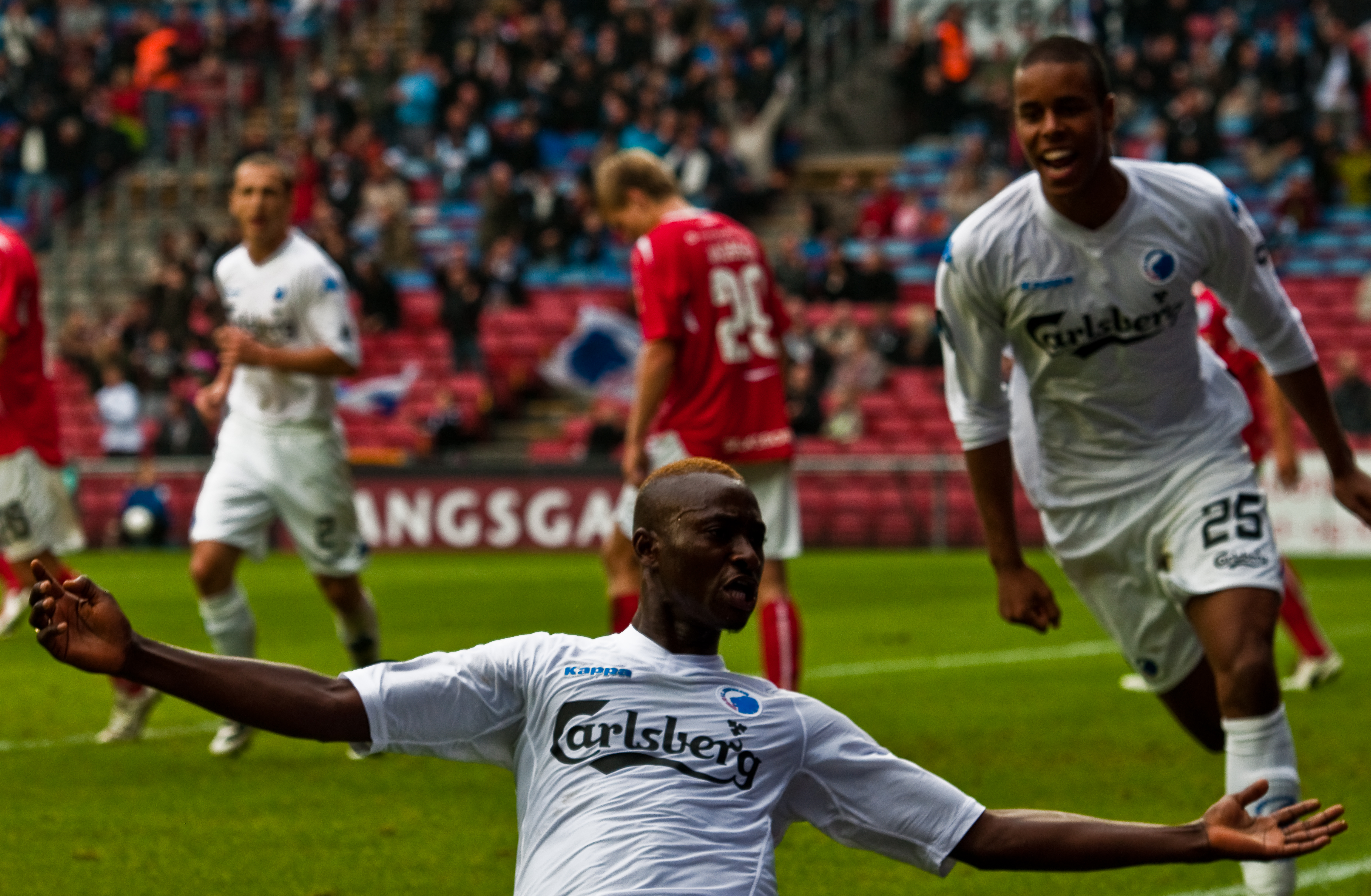 FCK vs. Silkeborg